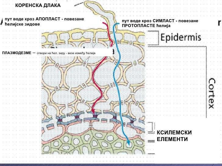 Transport vode kroz biljku